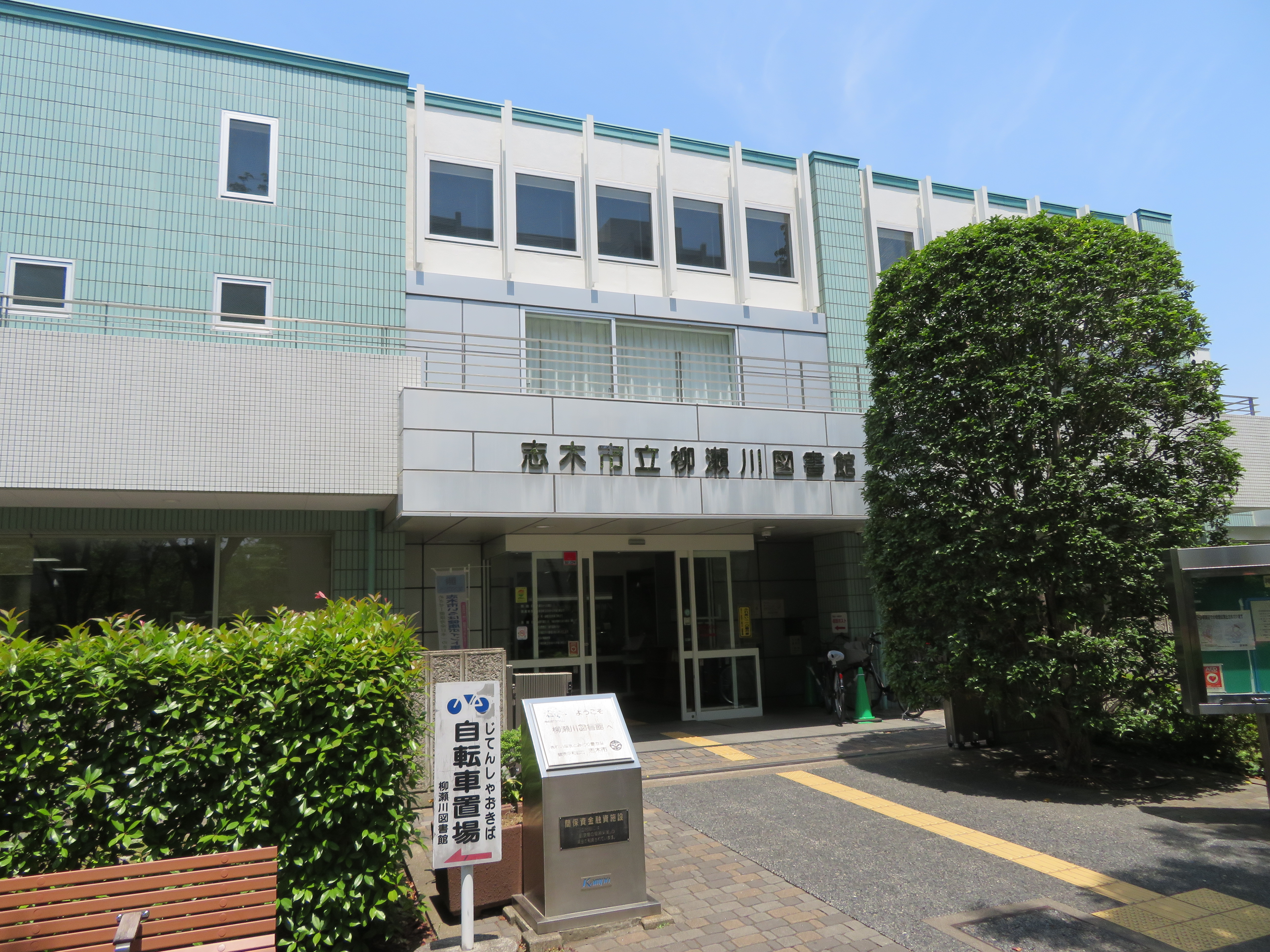 志木市立柳瀬川図書館（入口付近を撮影）